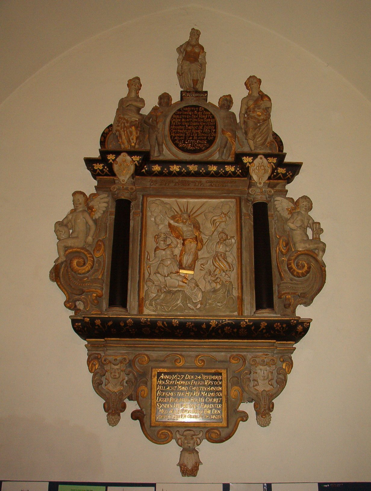 Sankt Petri kyrka, Malmö, epitafum from 1627.jpg. Hangs in the vapenhus, (church tower) Date:December 2005